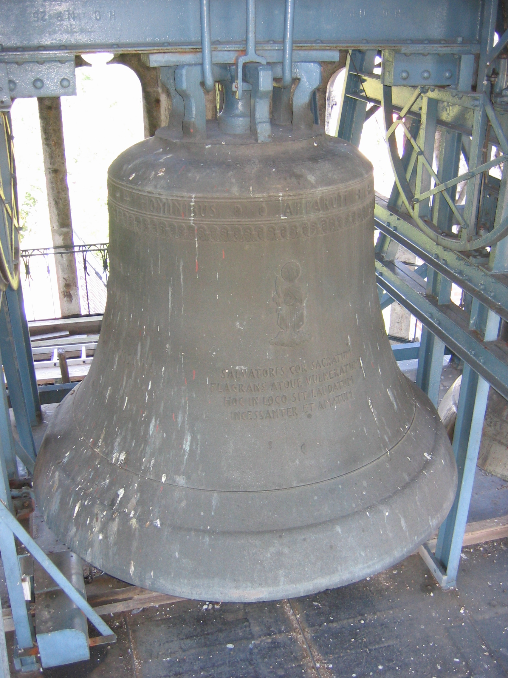 Hosanna - Große Glocke der Erzabtei St. Ottilien